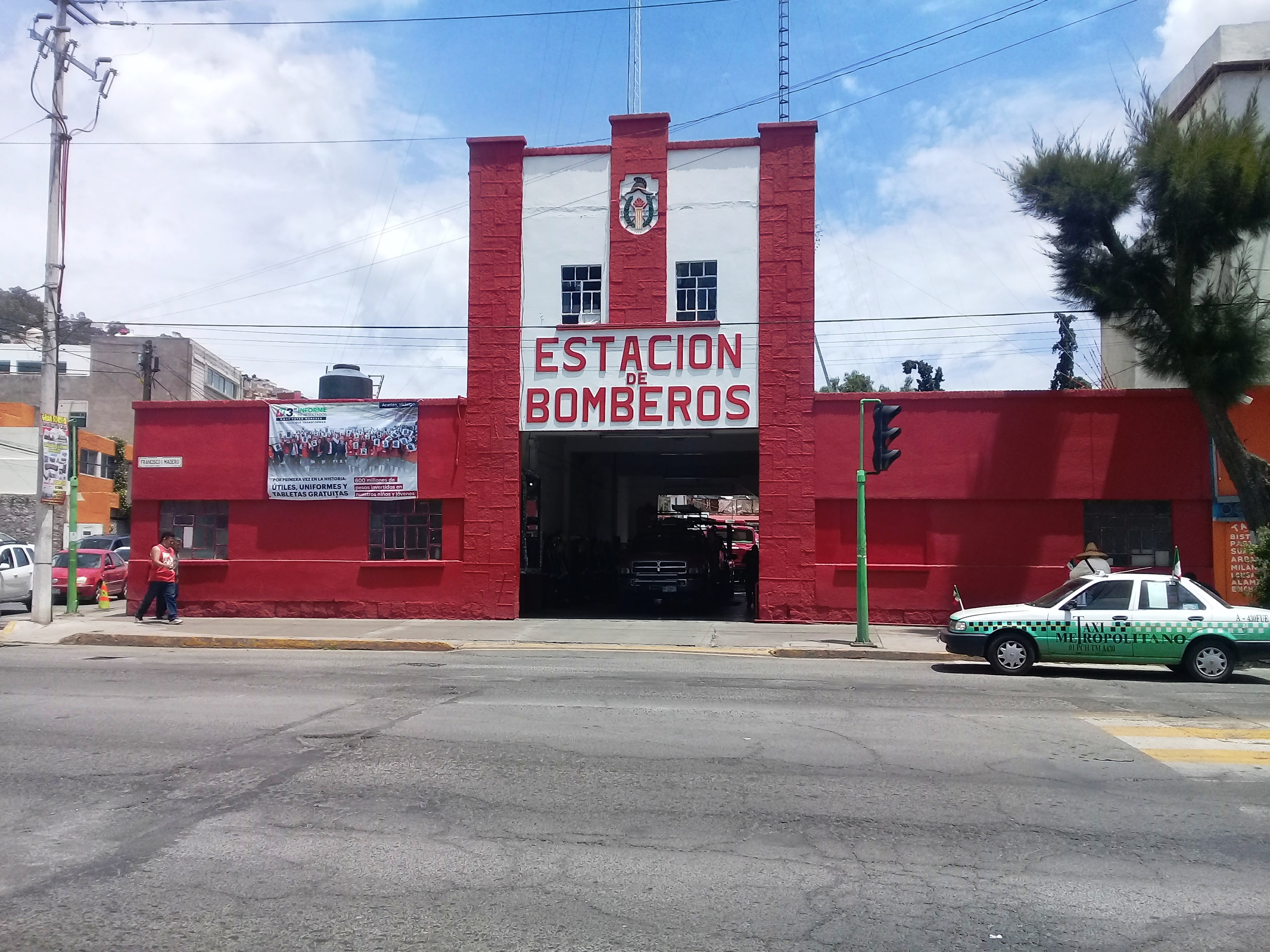 Estación de Bomberos de Pachuca.